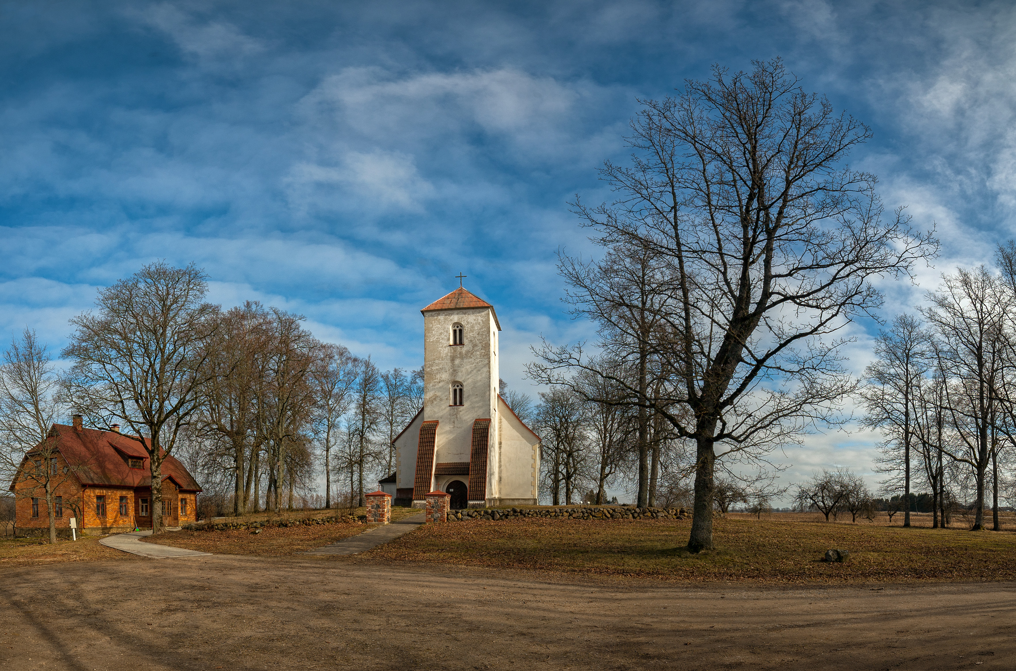 Vārmes Sv. Miķeļa baznīca